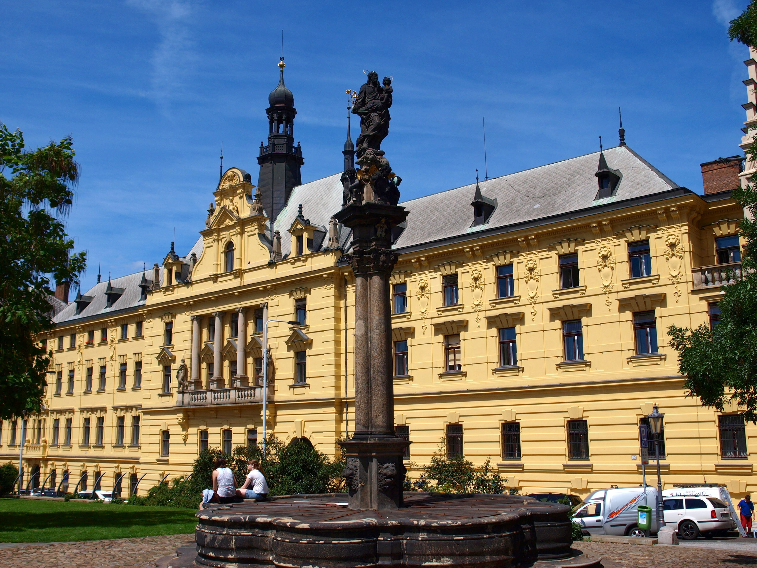 Městský soud v Praze (novoměstská radnice)